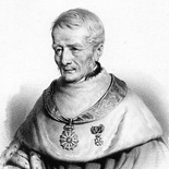 Portrait de Philippe-Antoine Merlin de Douai